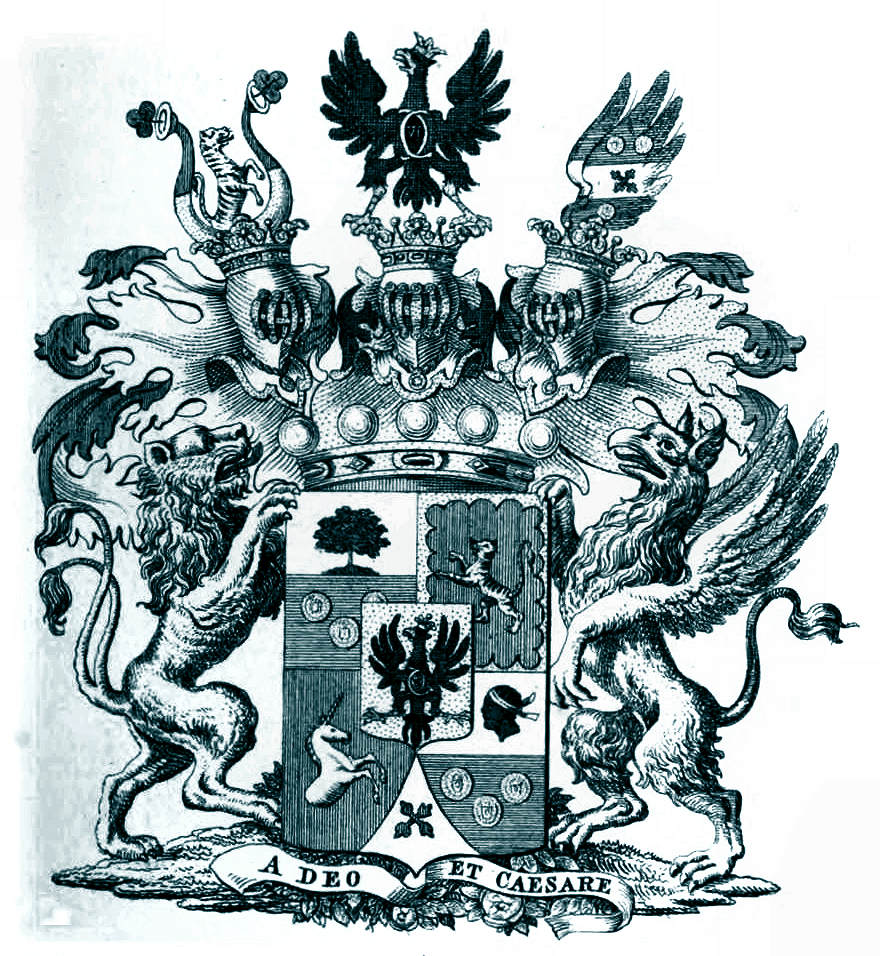 Wappen der Freiherren von Doblhoff-Dier von 1772 nach Tyroff